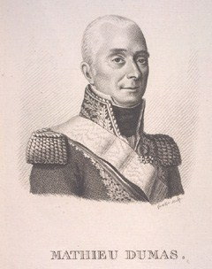 Général_Mathieu_Dumas